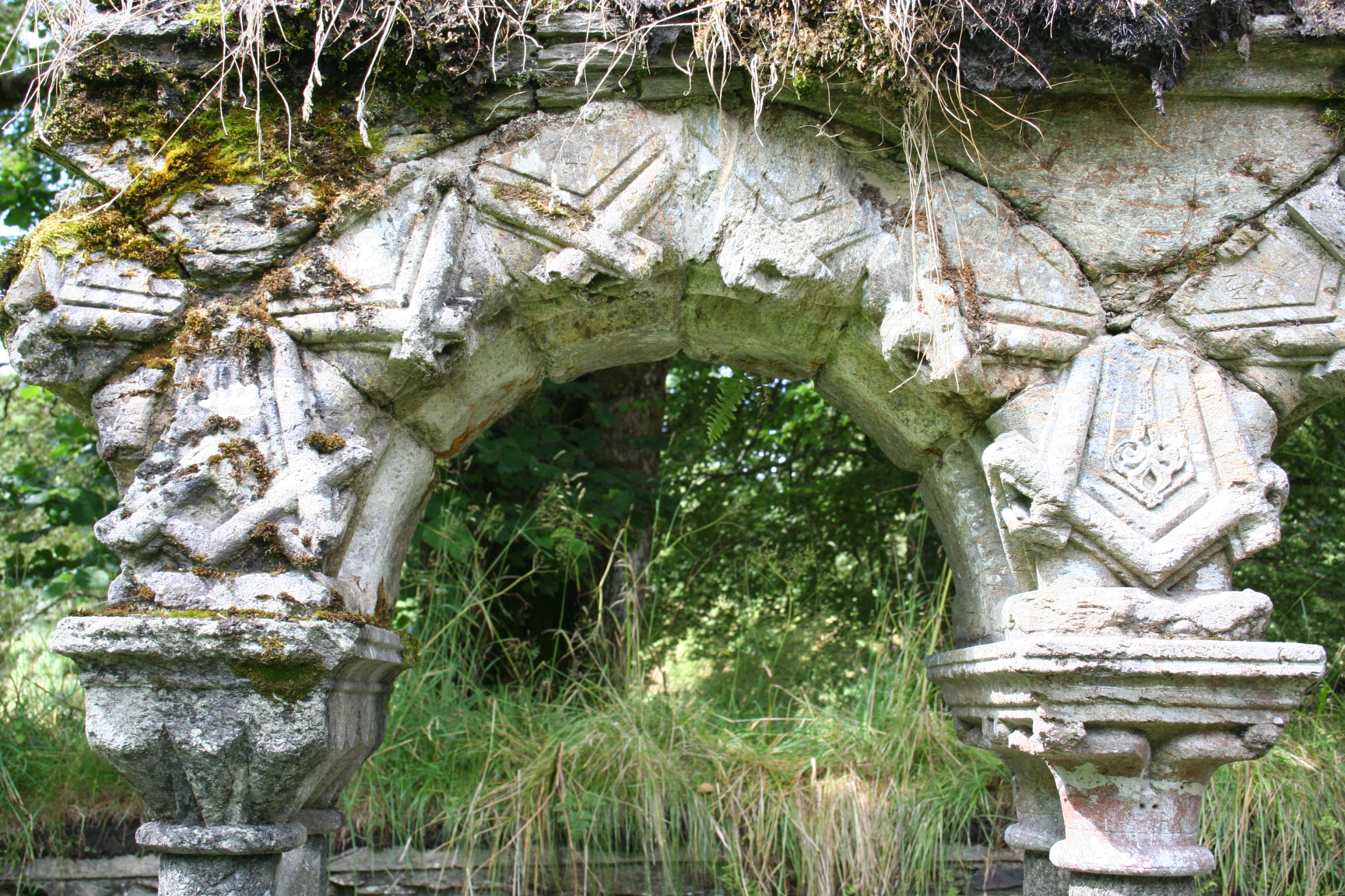 lysekloster romanisk ark